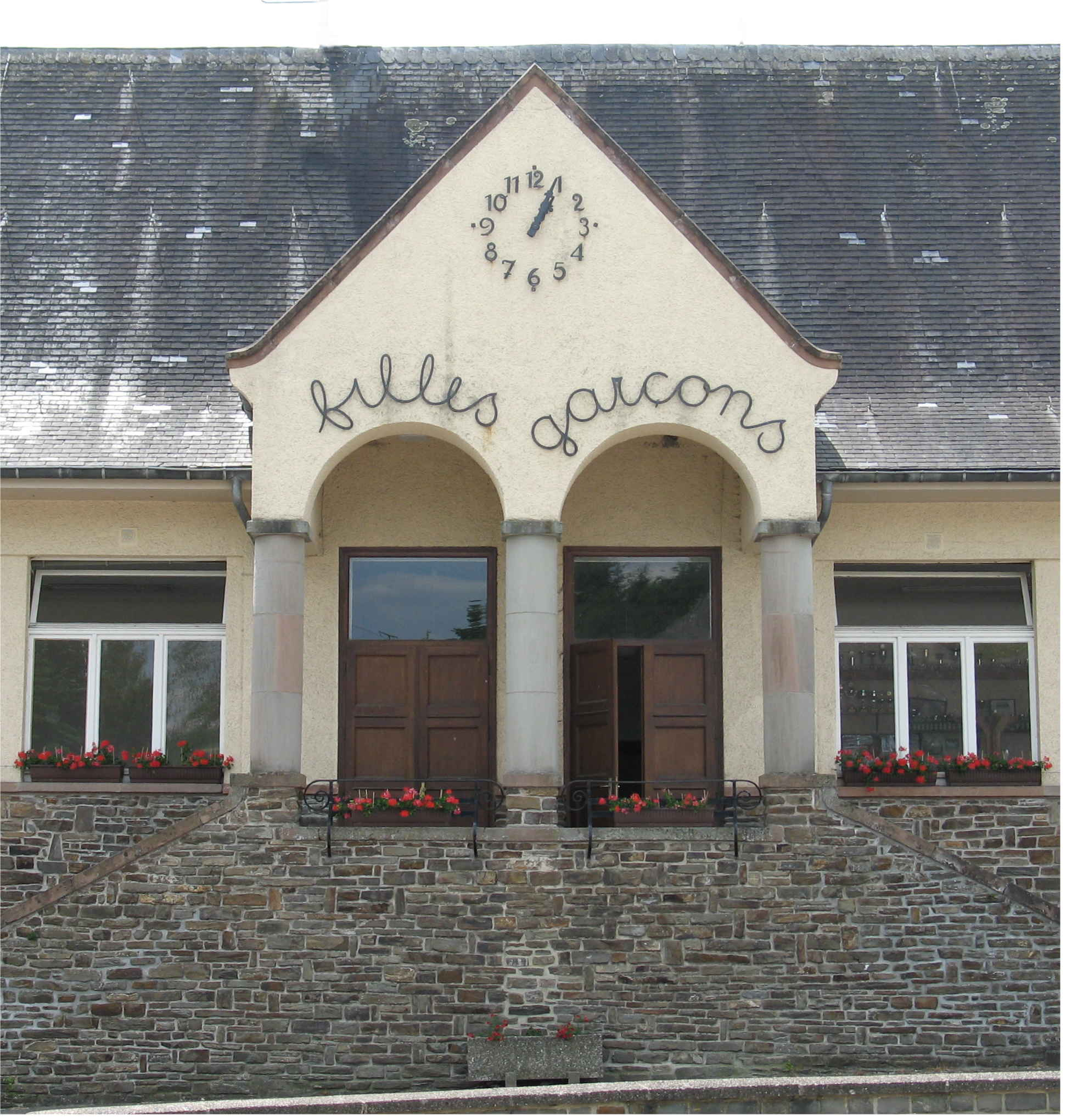 Eppes aus der aler Zäit zu Ueschdref.